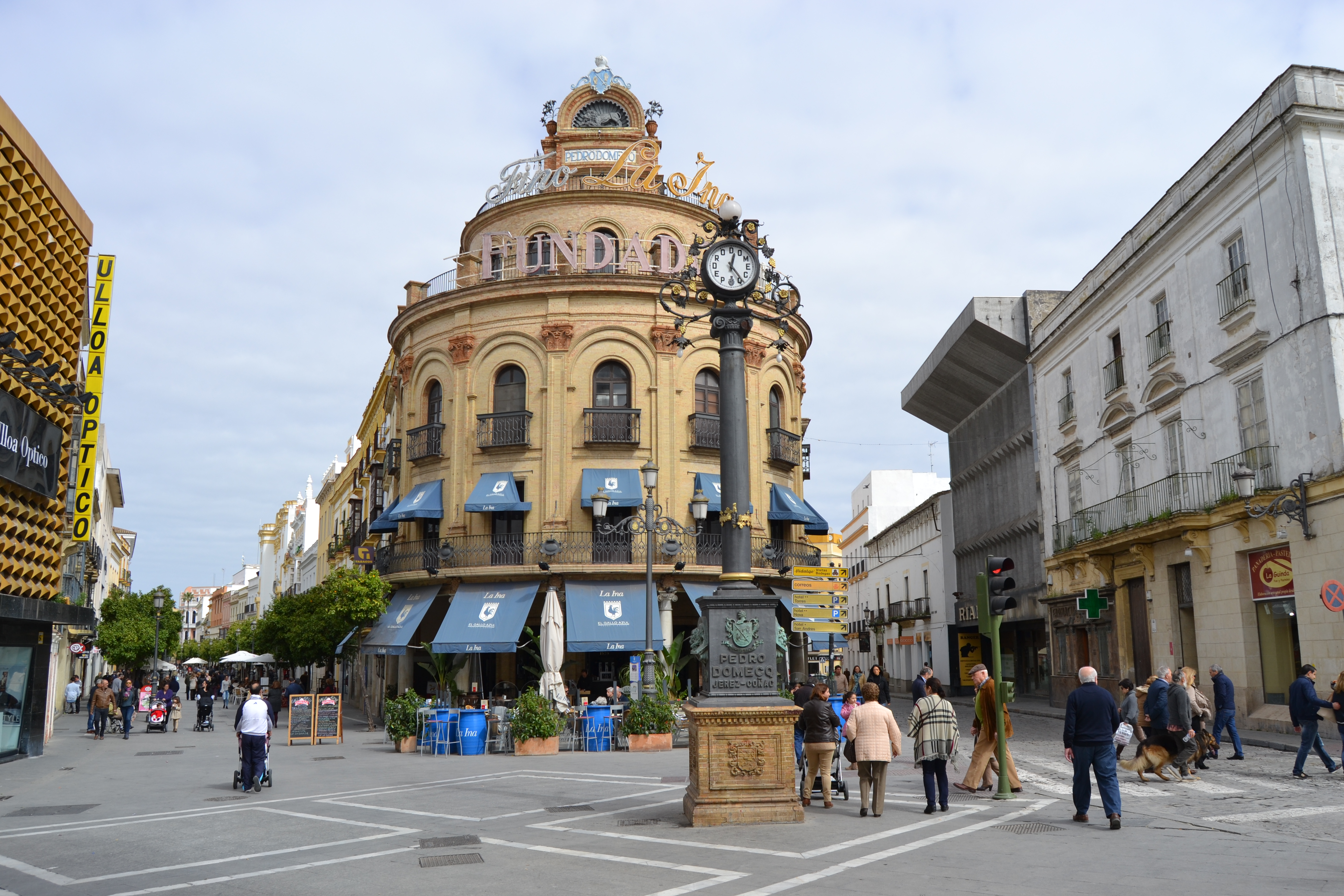 Jerez de la Frontera, Andalucía, España